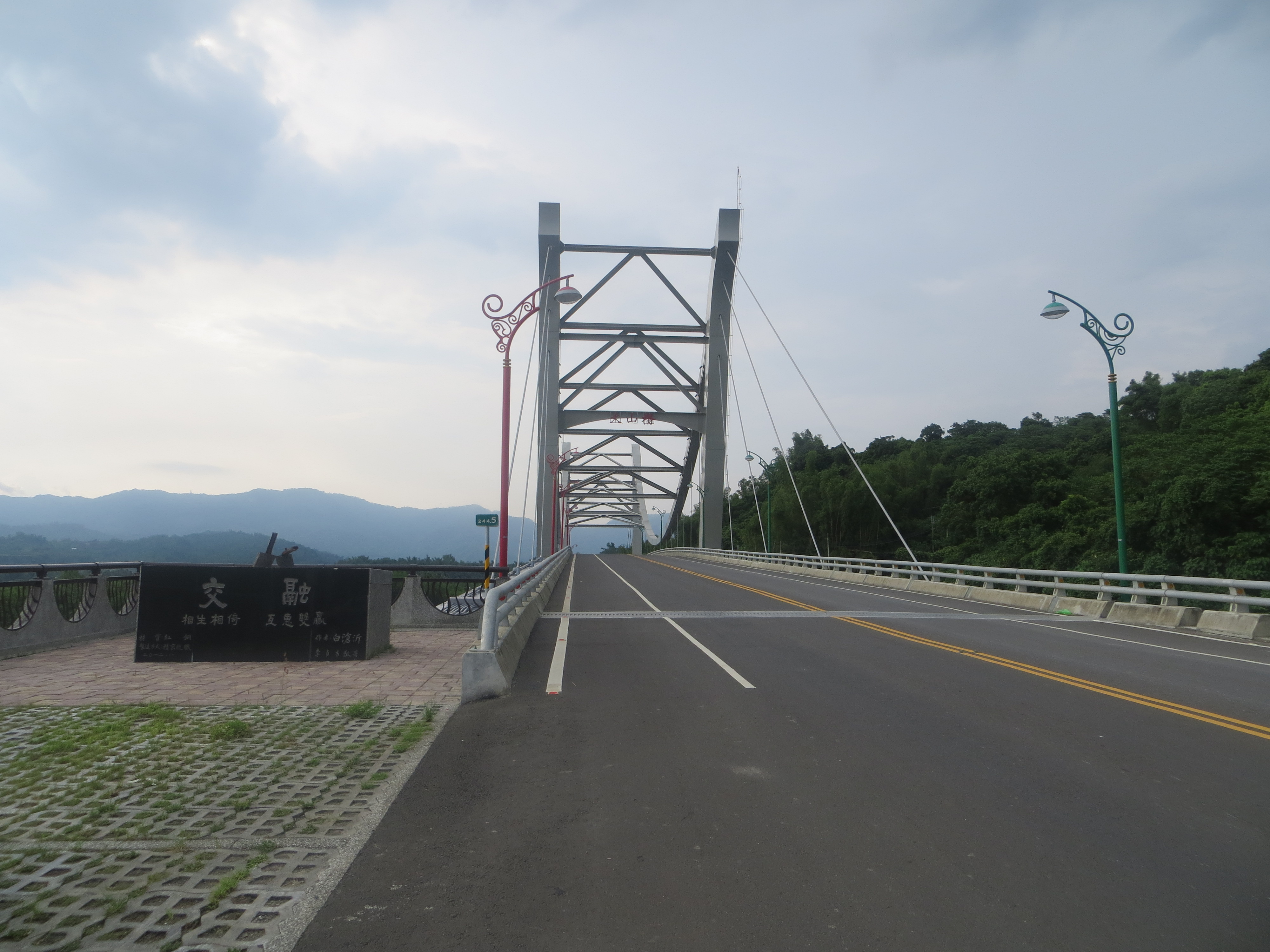 中文（台灣）: 台29線上，於八八風災後重建的火山橋，2012年通車，向甲仙方拍攝；當時此橋仍隸屬台21南段。